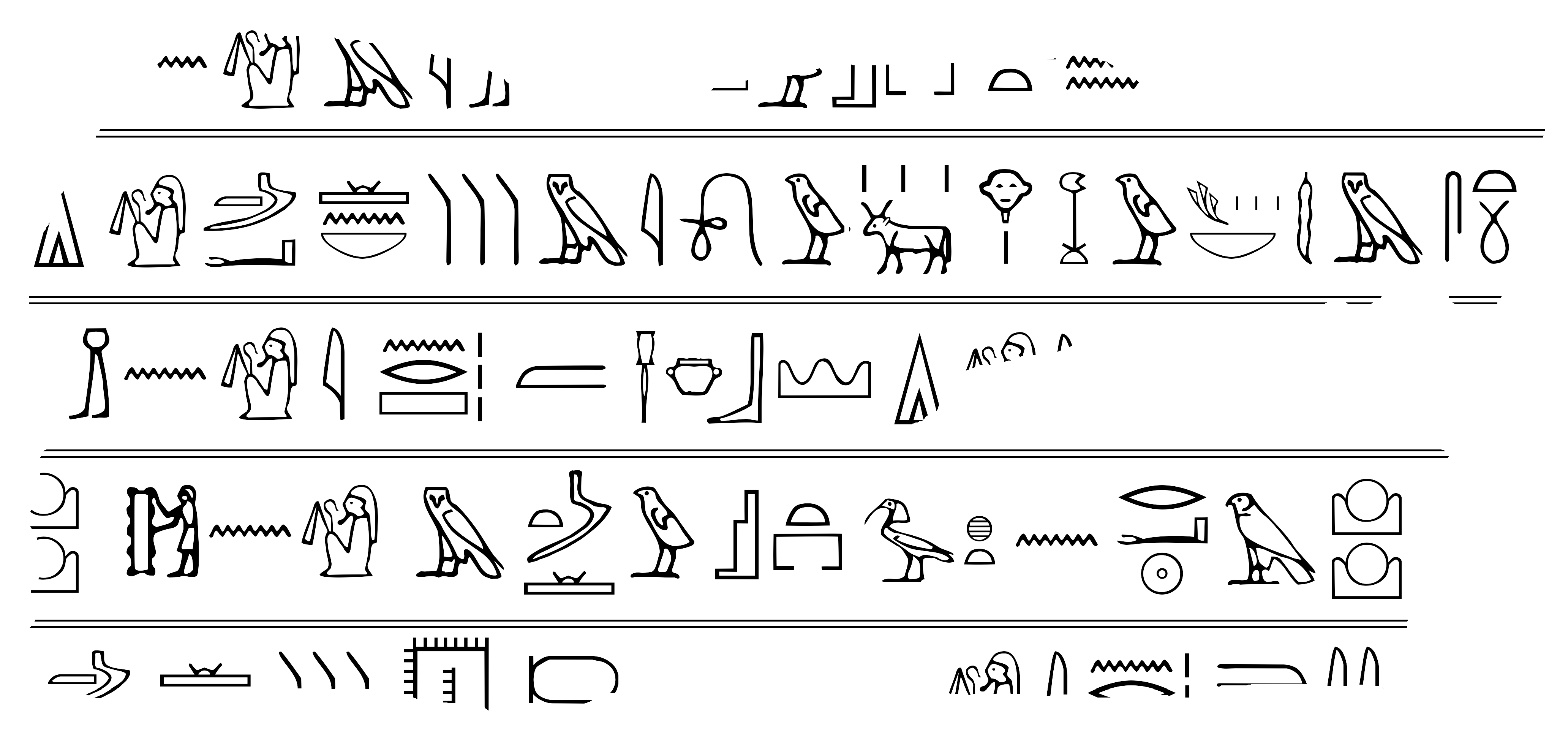 Pierre du Musée égyptien du Caire sur laquelle est mentionnée l'existence de la chambre d'Horus dans "le Mystère de la Grande Pyramide (t. I)".